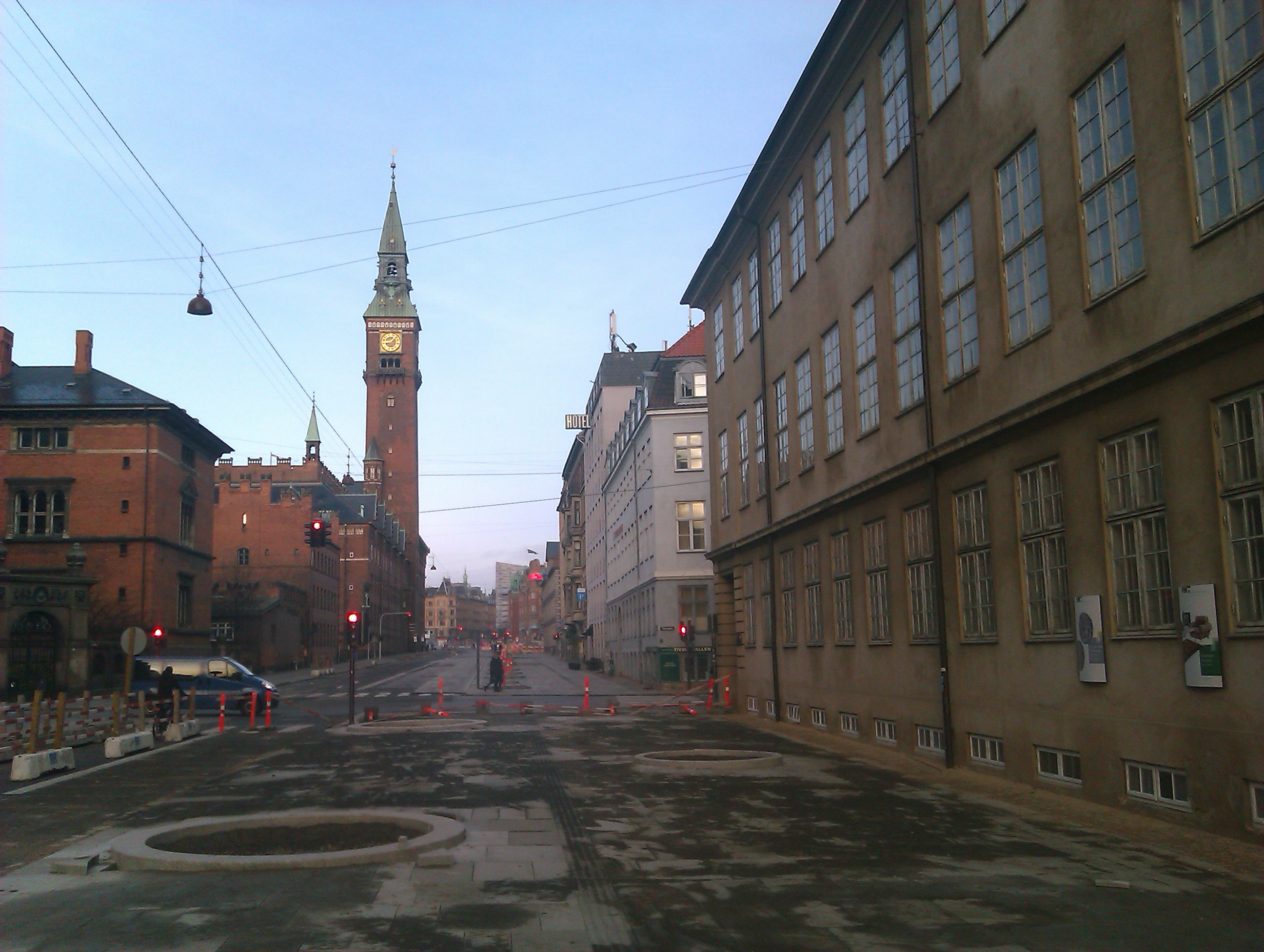 Vester Voldgade i København